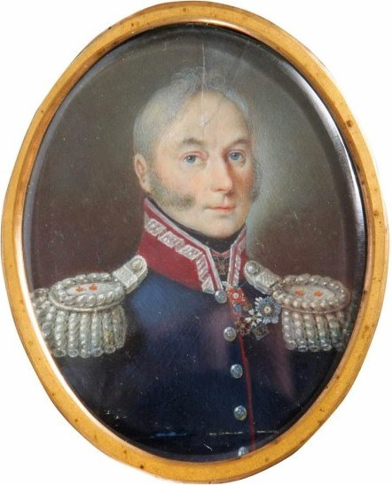 Portret generała brygady Wojska Polskiego z okresu Królestwa Polskiego